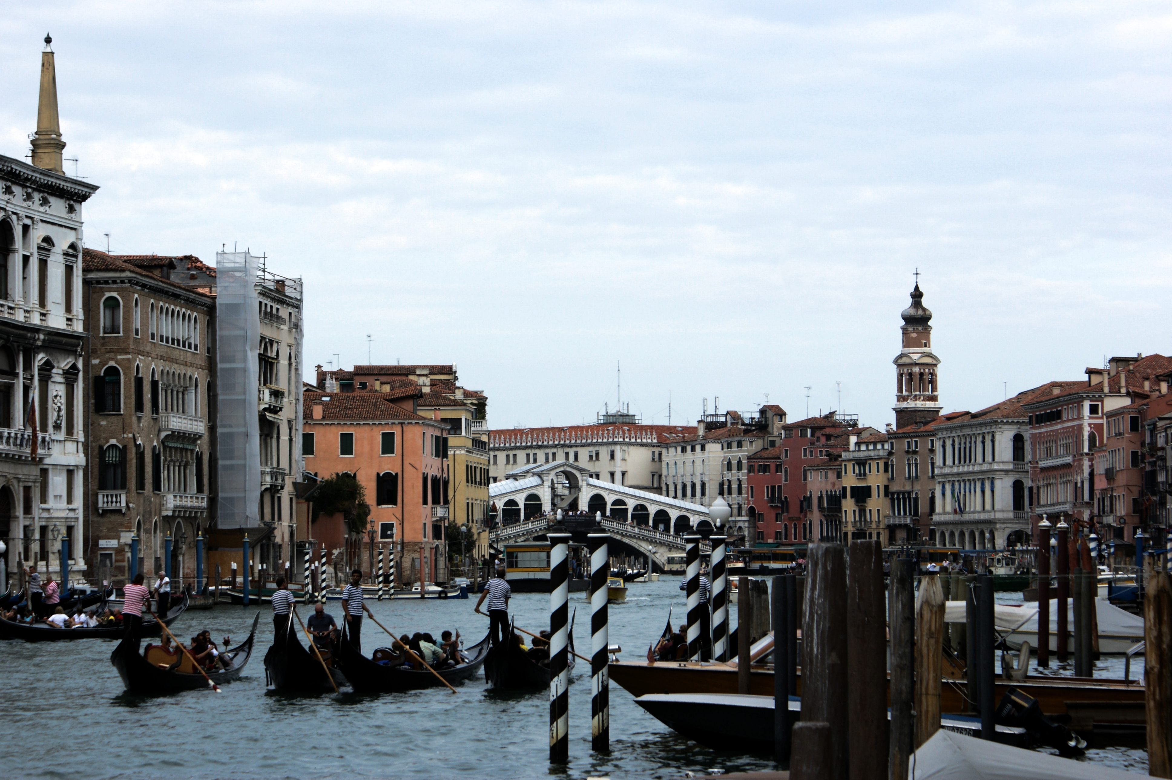 Venedig, Rialtobrücke